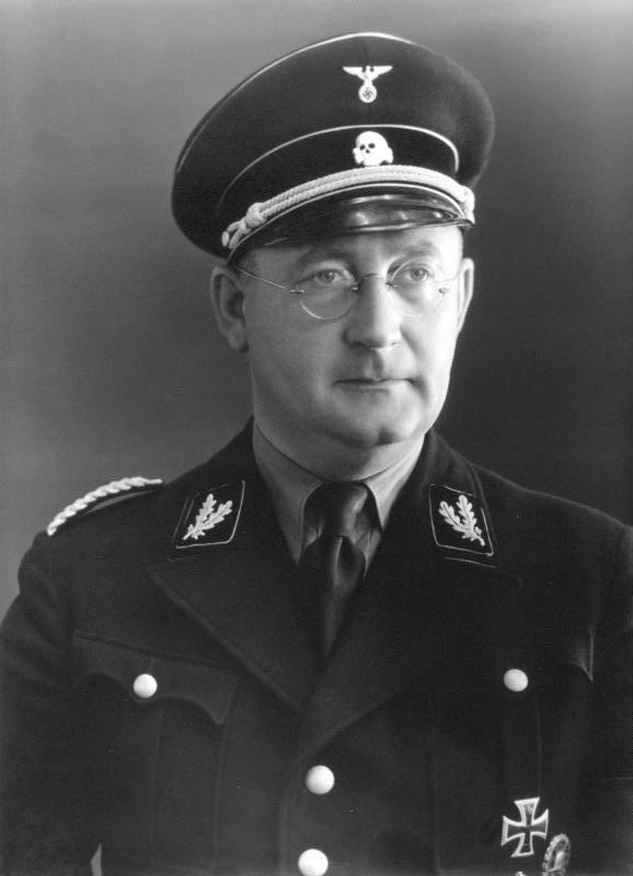 PflaumerMinister des Innern, Baden